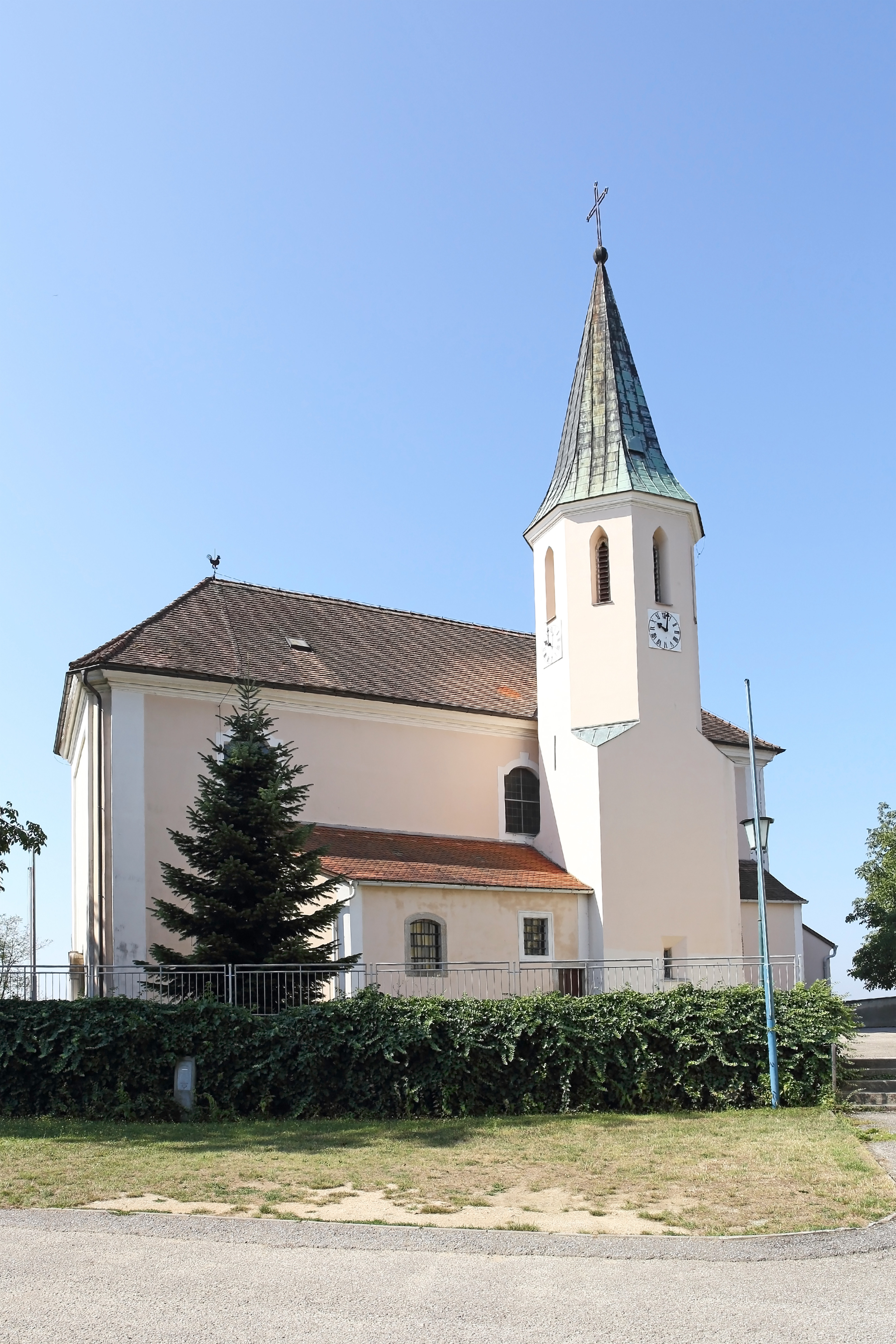 Die auf einem steil zur Donau abfallenden Hügel nordöstlich von Ebersdorf gelegene Pfarrkirche hl. Blasius ist ein barocker Saalbau mit einem niedrigen gotischen Nordturm.